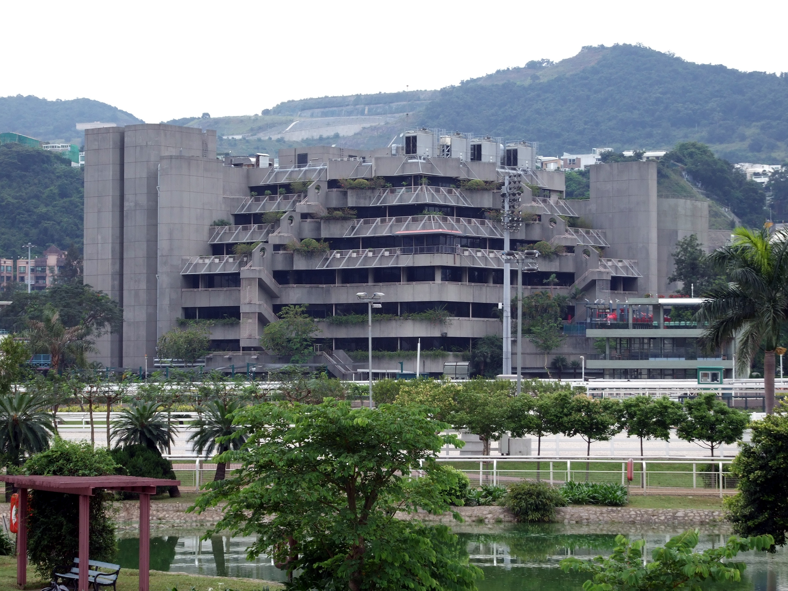 中文（香港）: 香港賽馬會沙田會所